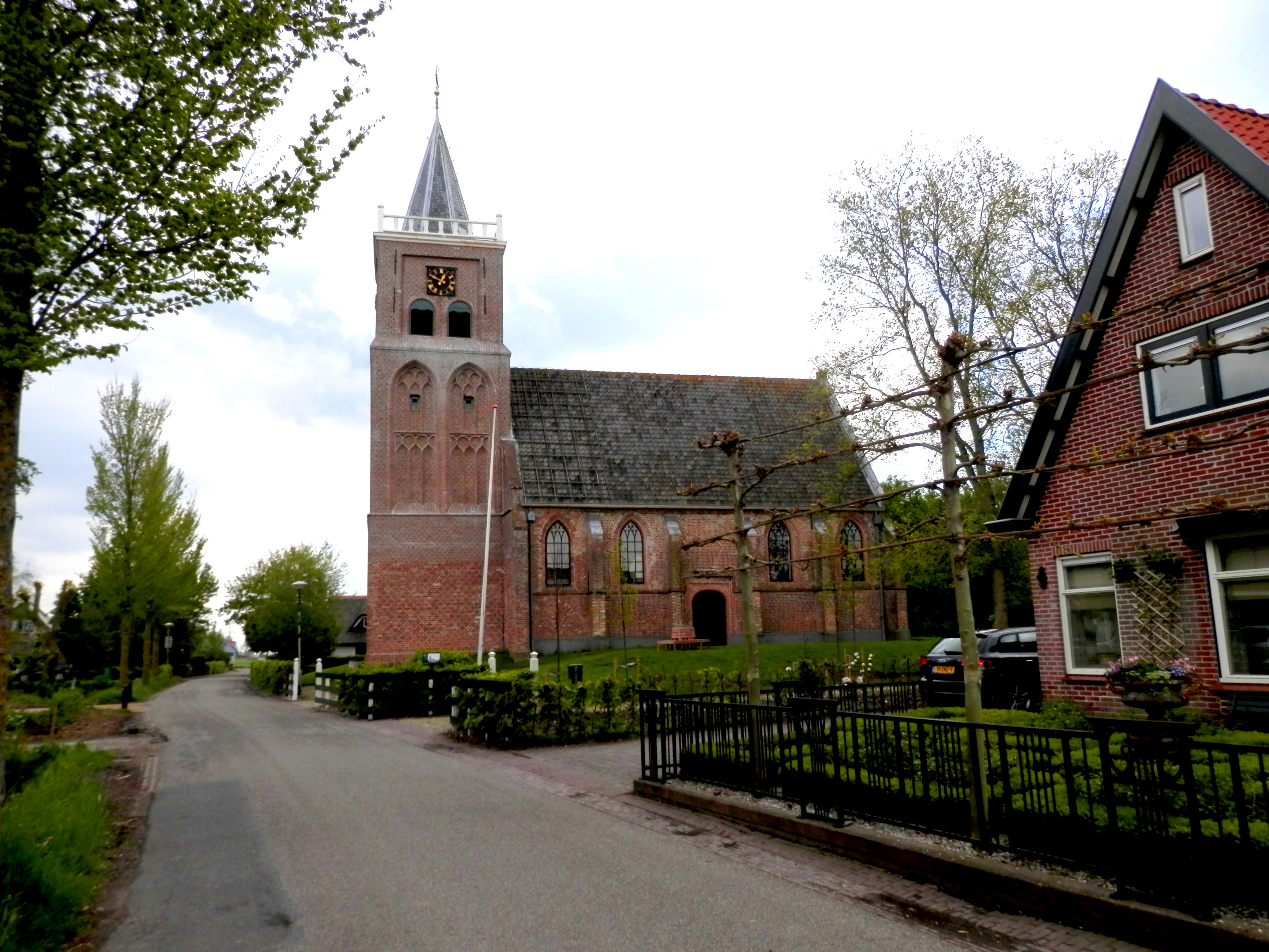 Haringhuizen, Dorpsstraat - Willibrorduskerk - 15e eeuw